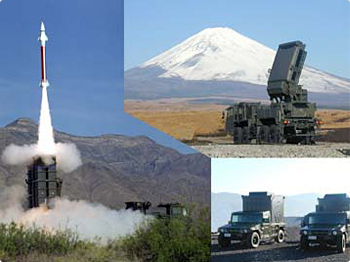 [全長]約4,900mm [直径]約320mm [重量]約570Kg [製作]三菱電機 03式中距離地対空誘導弾は、改良ホークの後継として技術研究本部が開発を進めていた純国産の誘導弾。師団等及び重要地域の防空を行うため、方面高射特科部隊に装備される。 ja:03式中距離地対空誘導弾